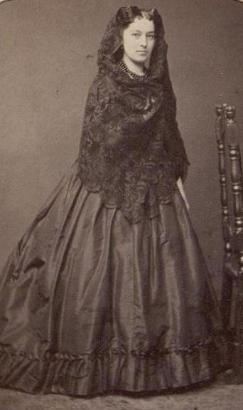 Ольга де Лагрене (1838—1897), канонисса.